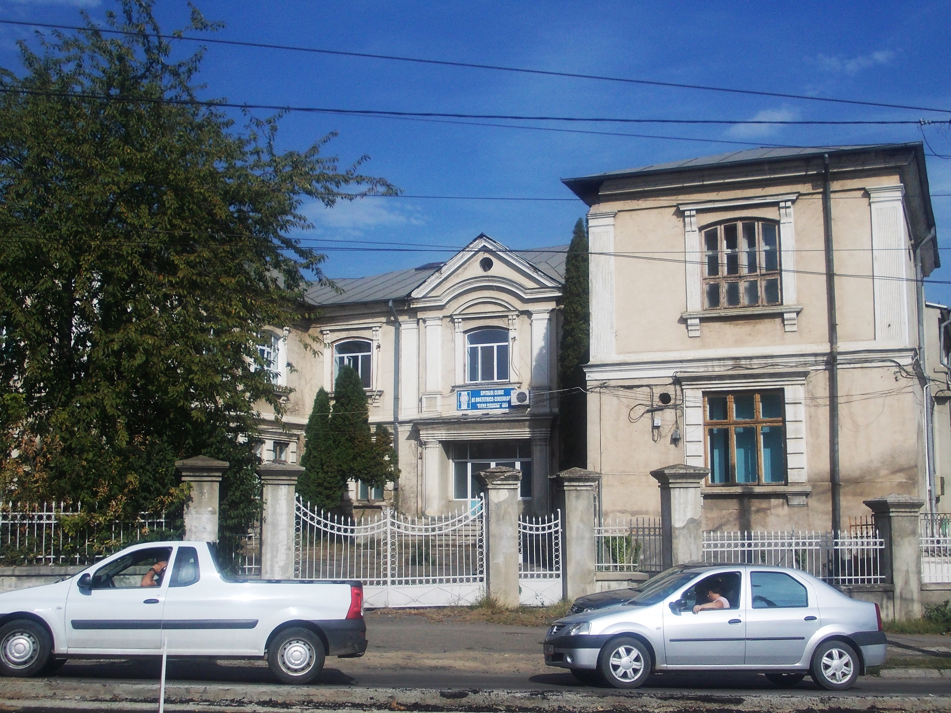 municipiul Iași, Str. Elena Doamna 49